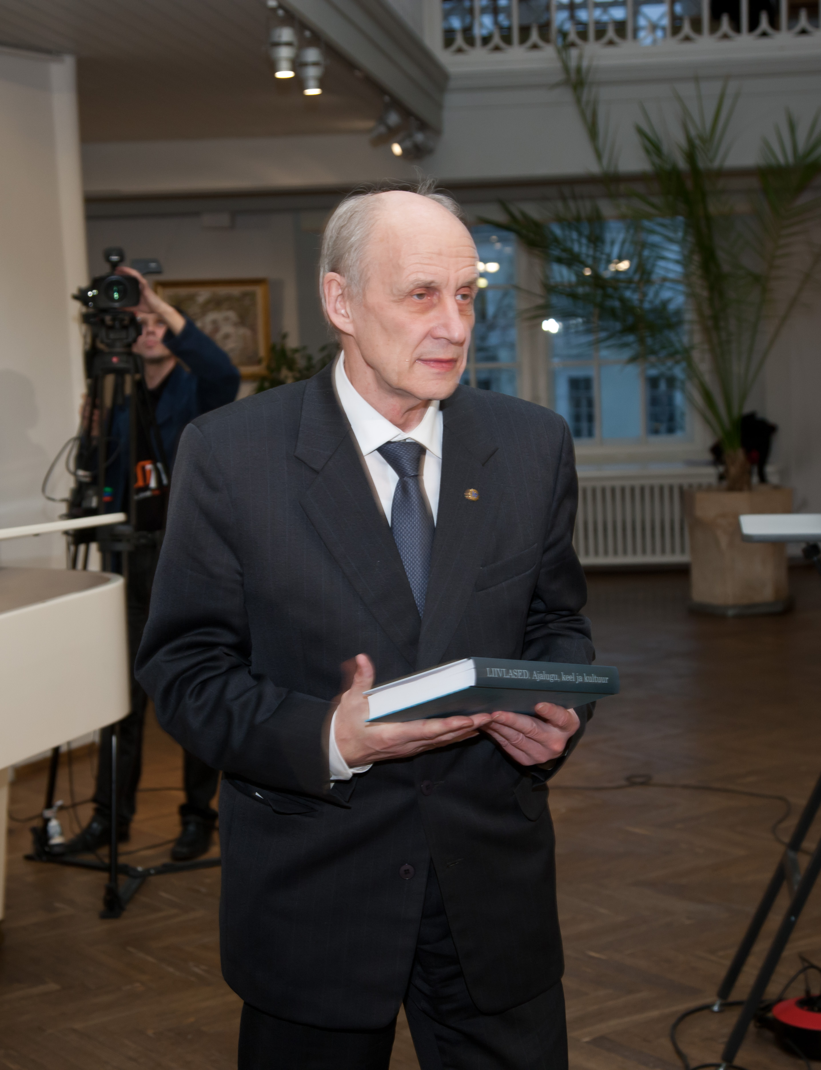 25. novembril 2011 toimus TÜ ajaloo muuseumis konverents "Liivlased. Maa. Rahvas. Ajalugu". Pildil emeriitprofessor Tiit-Rein Viitsoo.